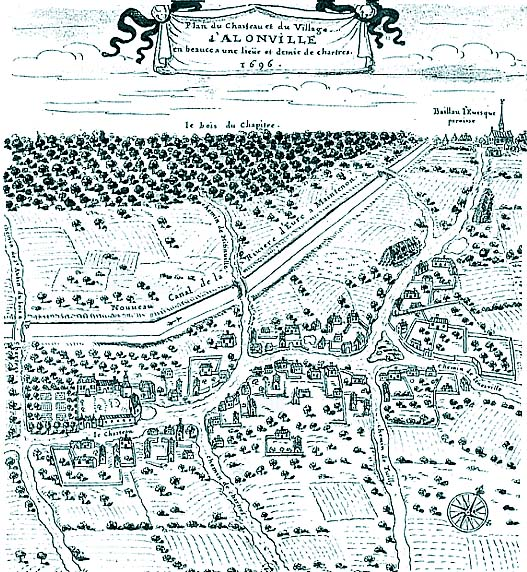 Lithographie château famille d'Allonville Beauce Chartres 1696